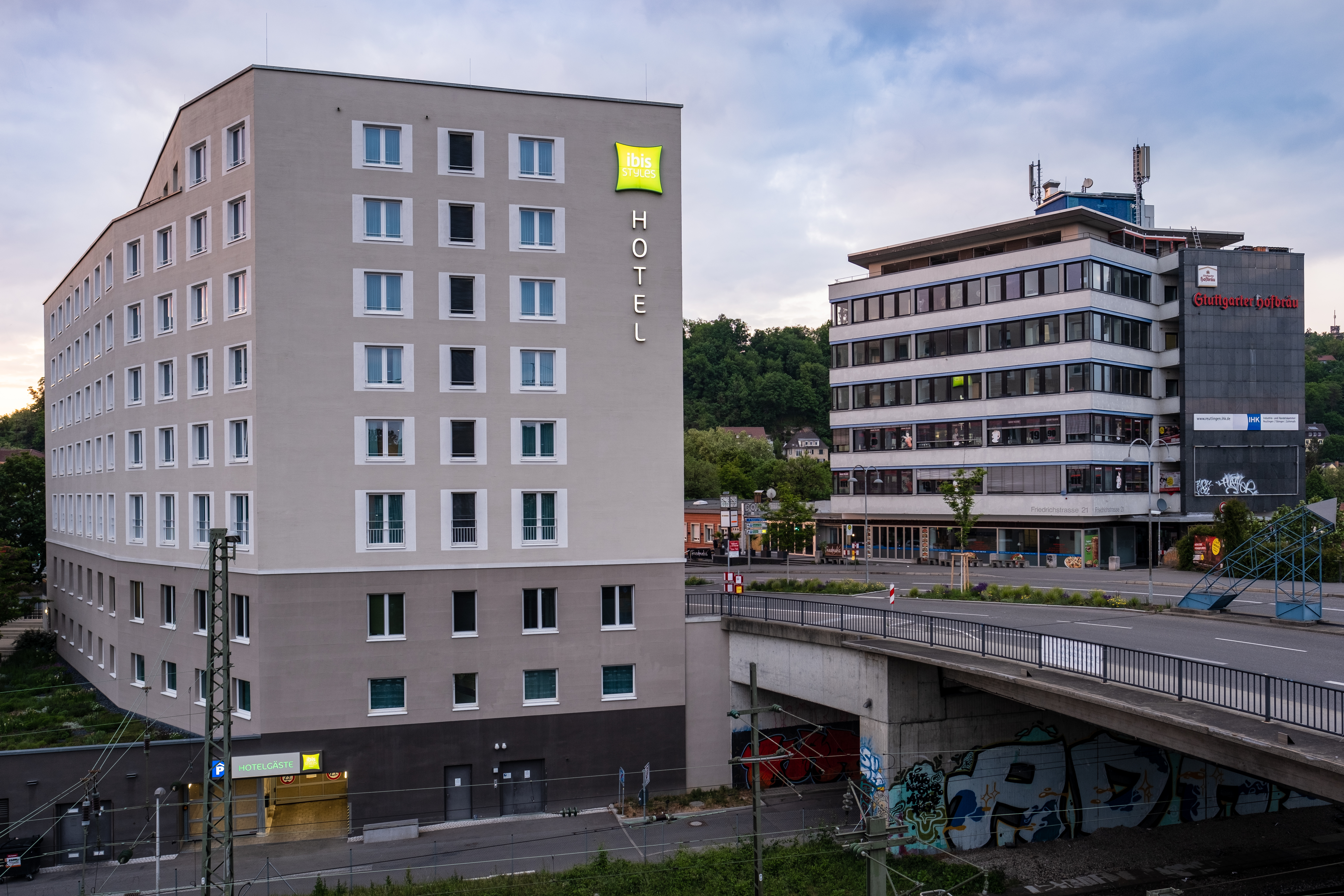 Ibis Hotel an der Blauen Brücke in Tübingen und Blauer Turm